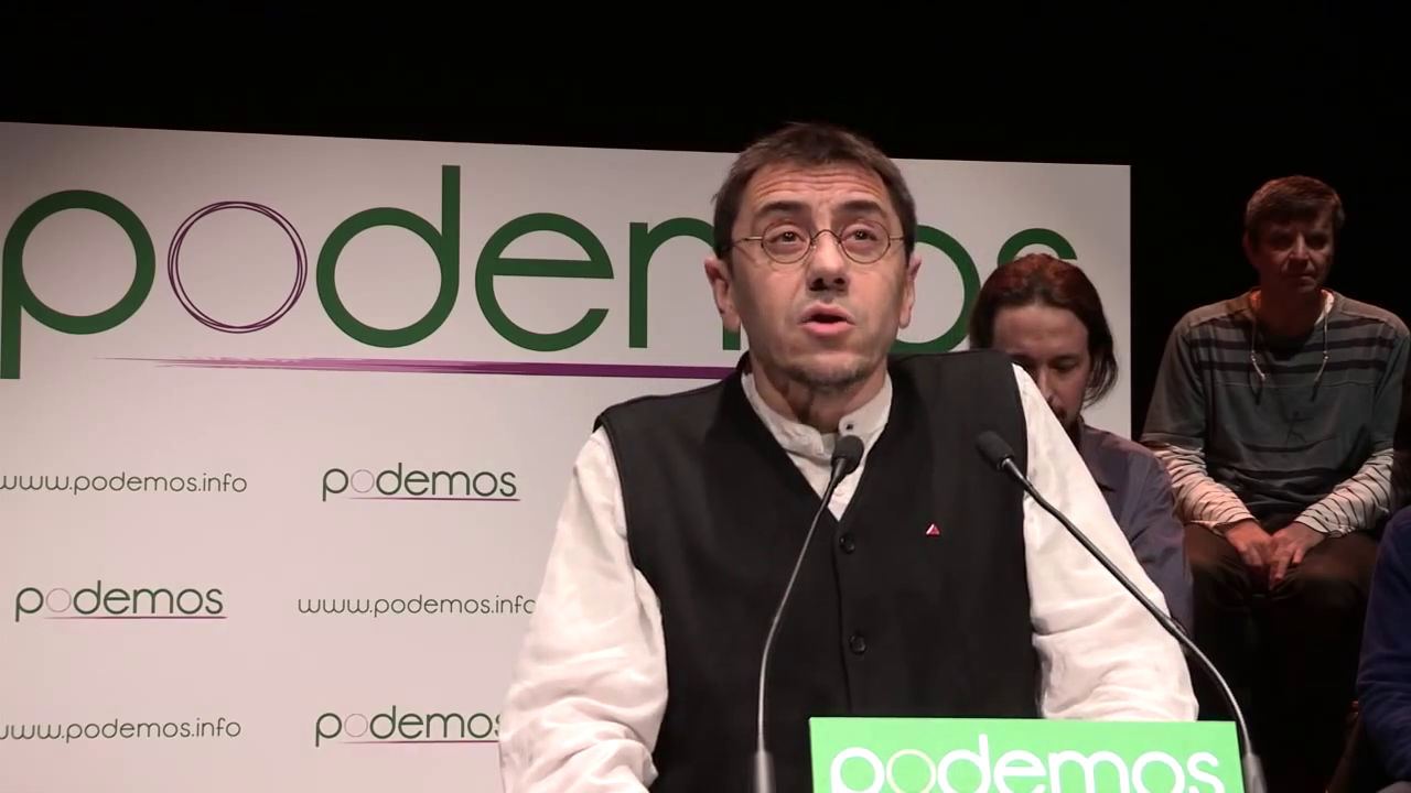 Presentación de Podemos en Madrid (16 de enero de 2014)